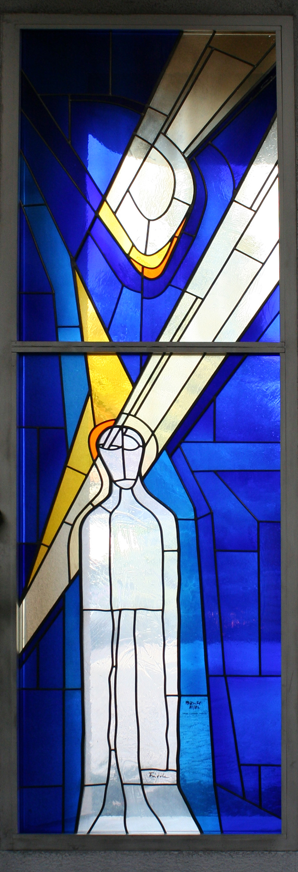 Römisch-katholische Kirche Bruder Klaus Zumikon, Glasfenster von Jean Bünter